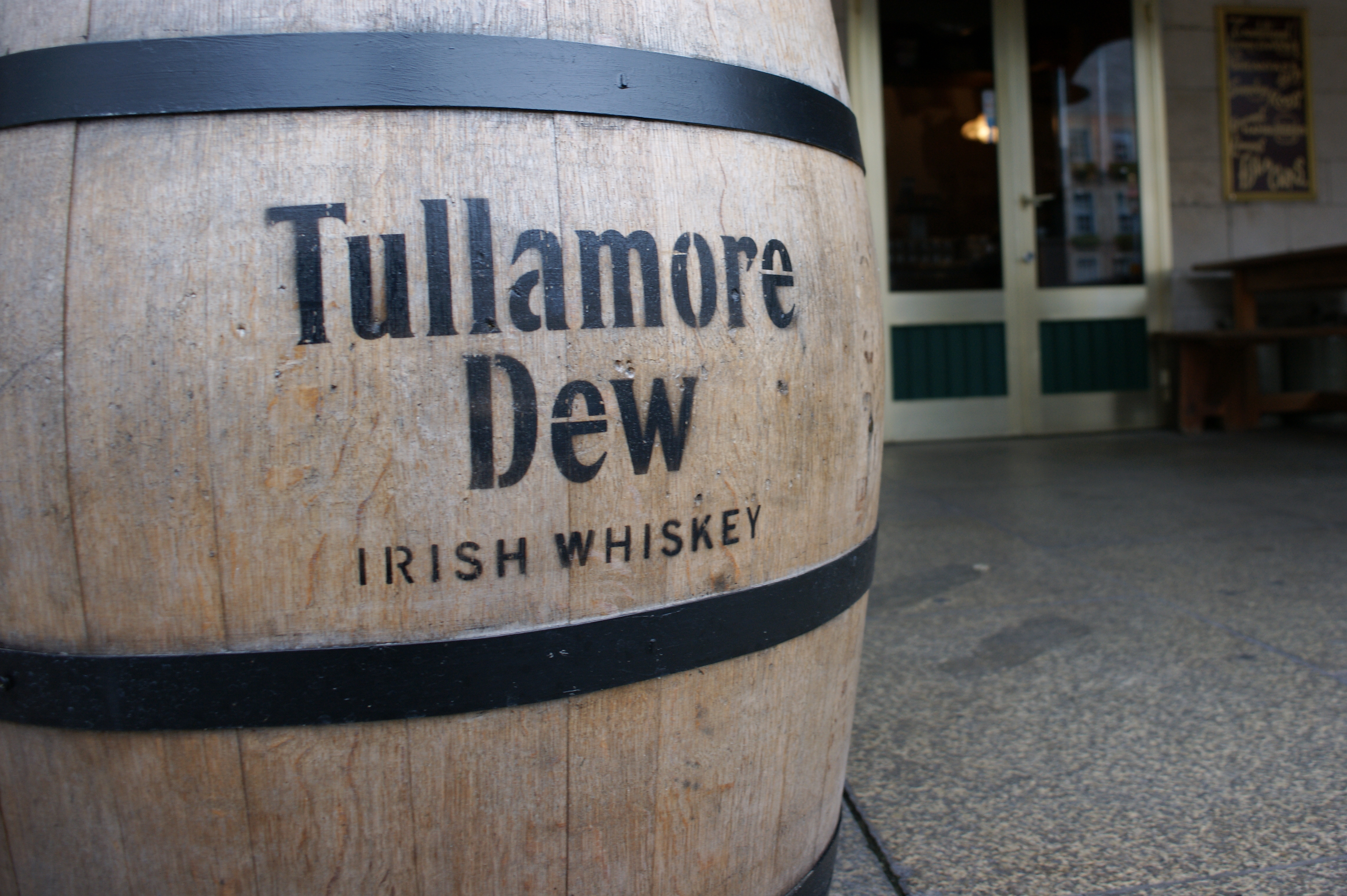 Tullamore Dew (Fass)